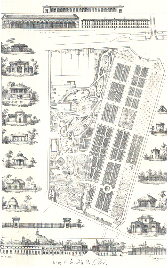 Jardin des plantes, plate 37 from pattern-book Plans raisonnés de toutes les espèces de jardins by Gabriel Thouin